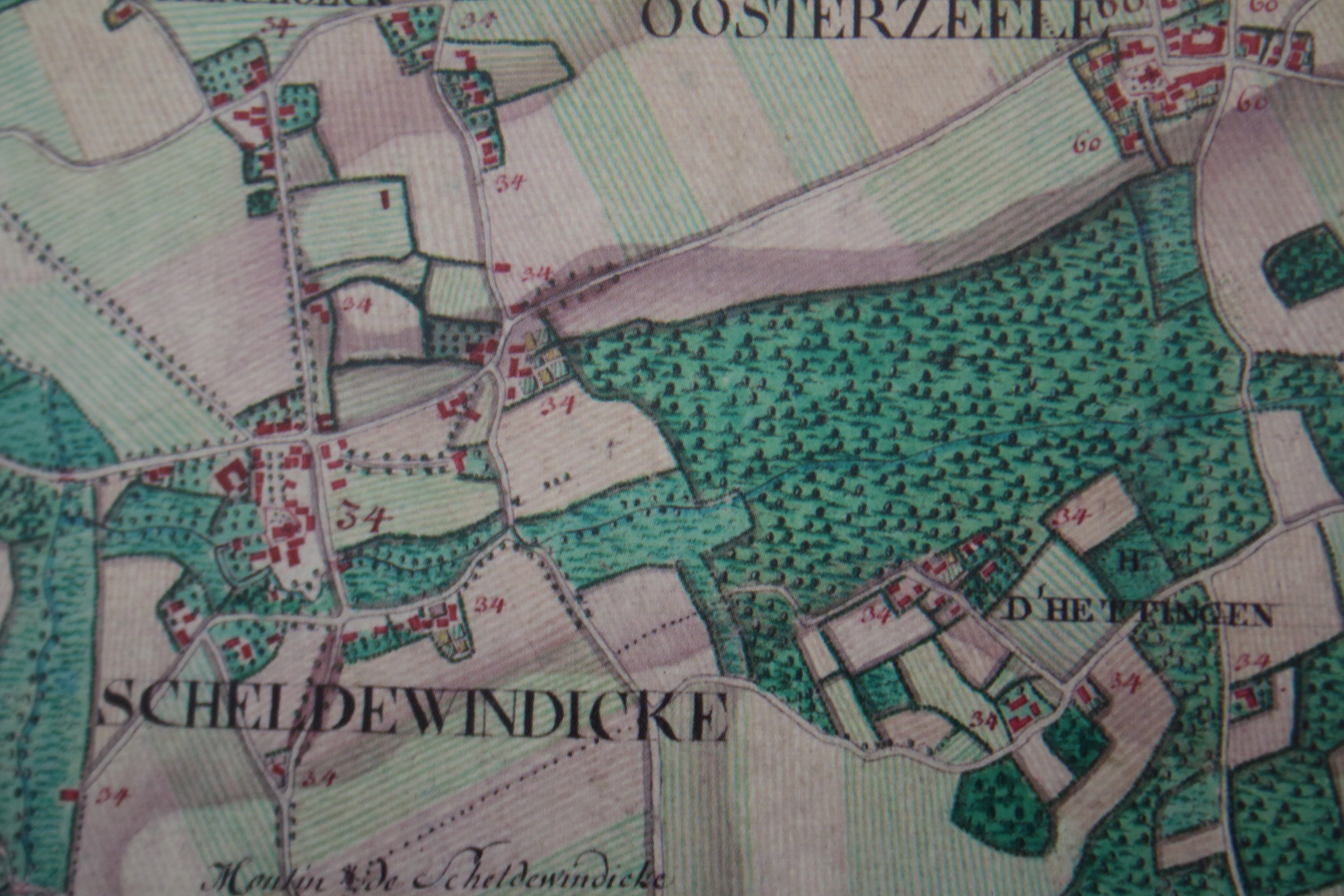 Ettingebos Ferraris